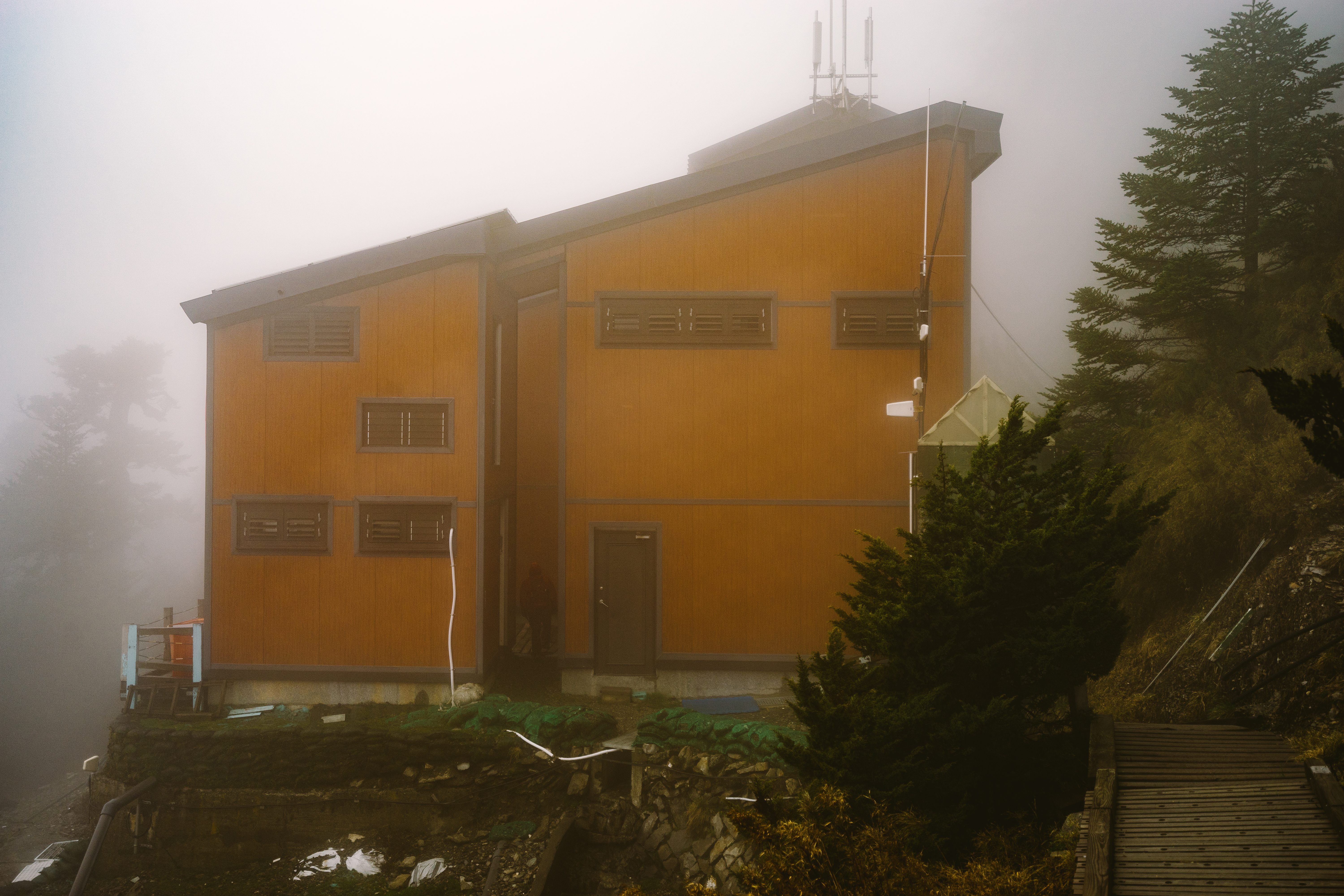 排雲山莊。